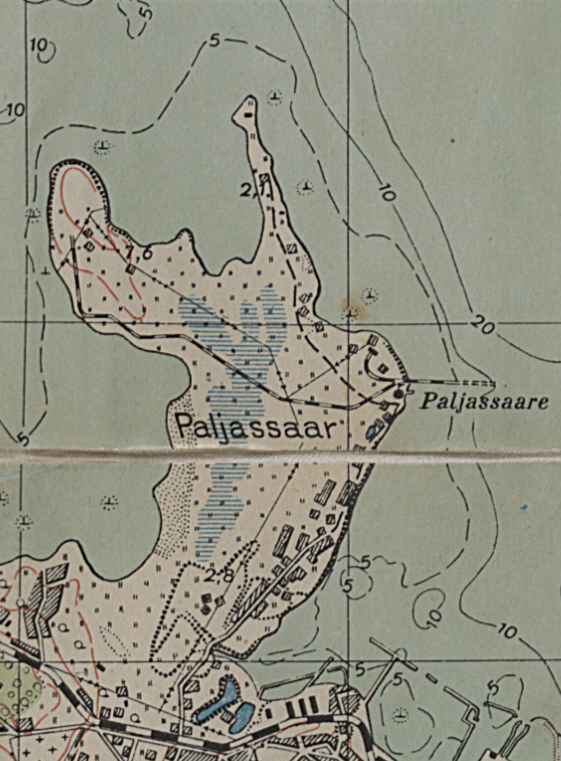 Paljassaare 1936. aasta Tallinna ümbruse kaardil